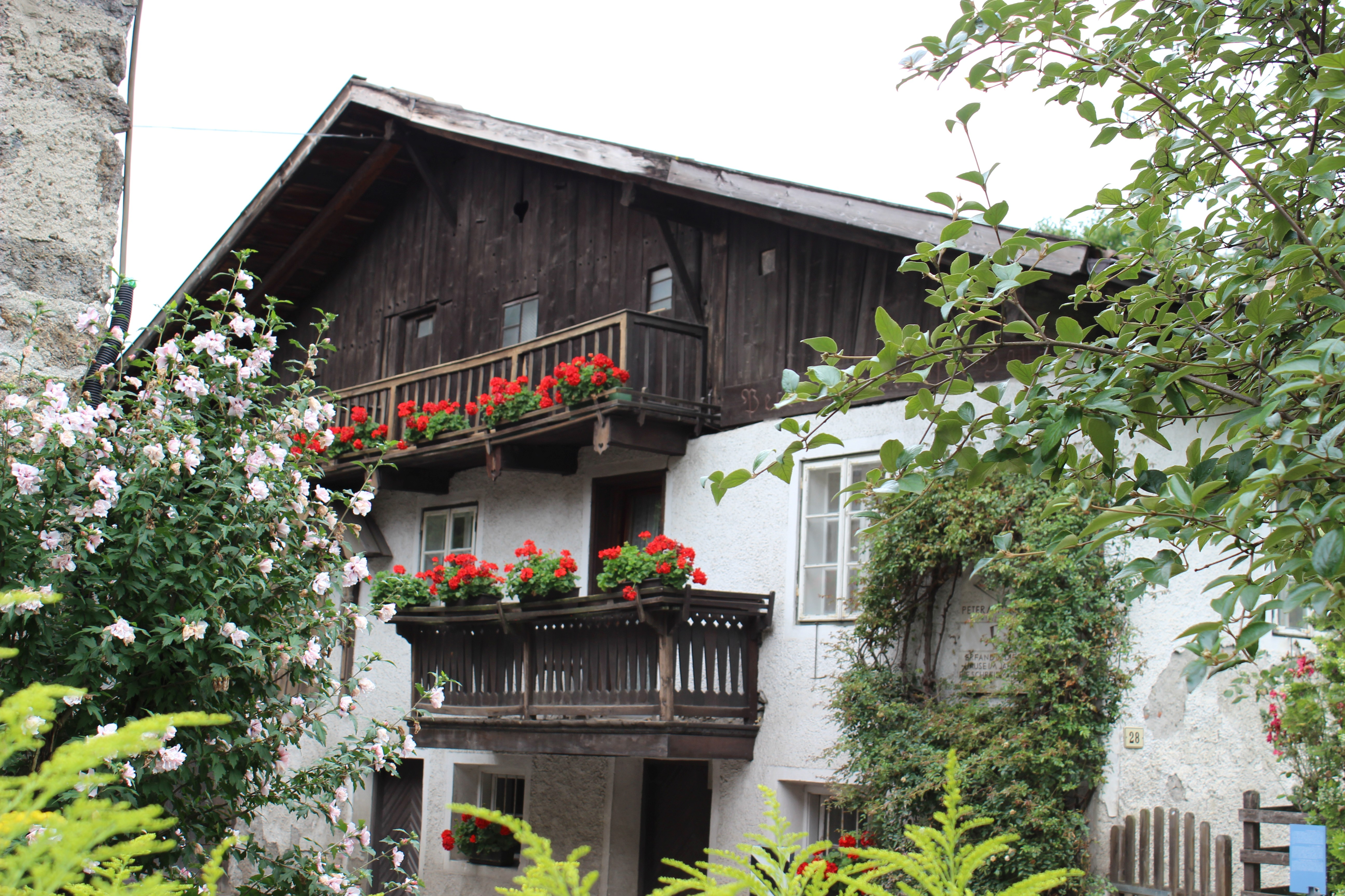 Peter-Mitterhofer-Straße 26 in Partschins (Südtirol)